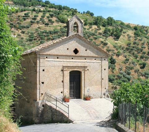 La chiesetta sorge su di una rupe in prossimità del fiume Tiro